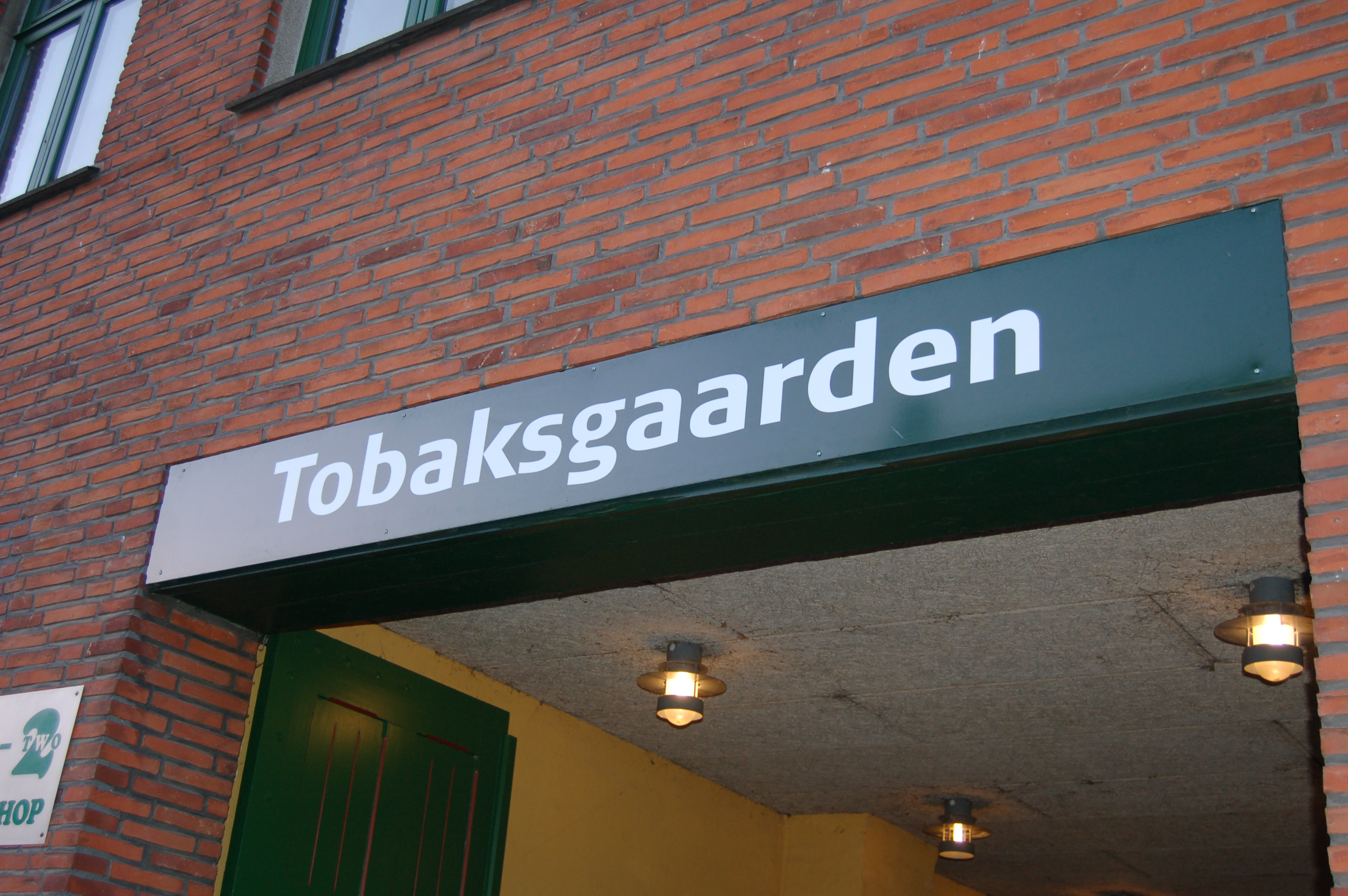 Tobaksgaarden, Culture assembly in Assens, Denmark